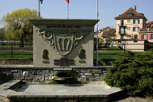 Moudon: Espace